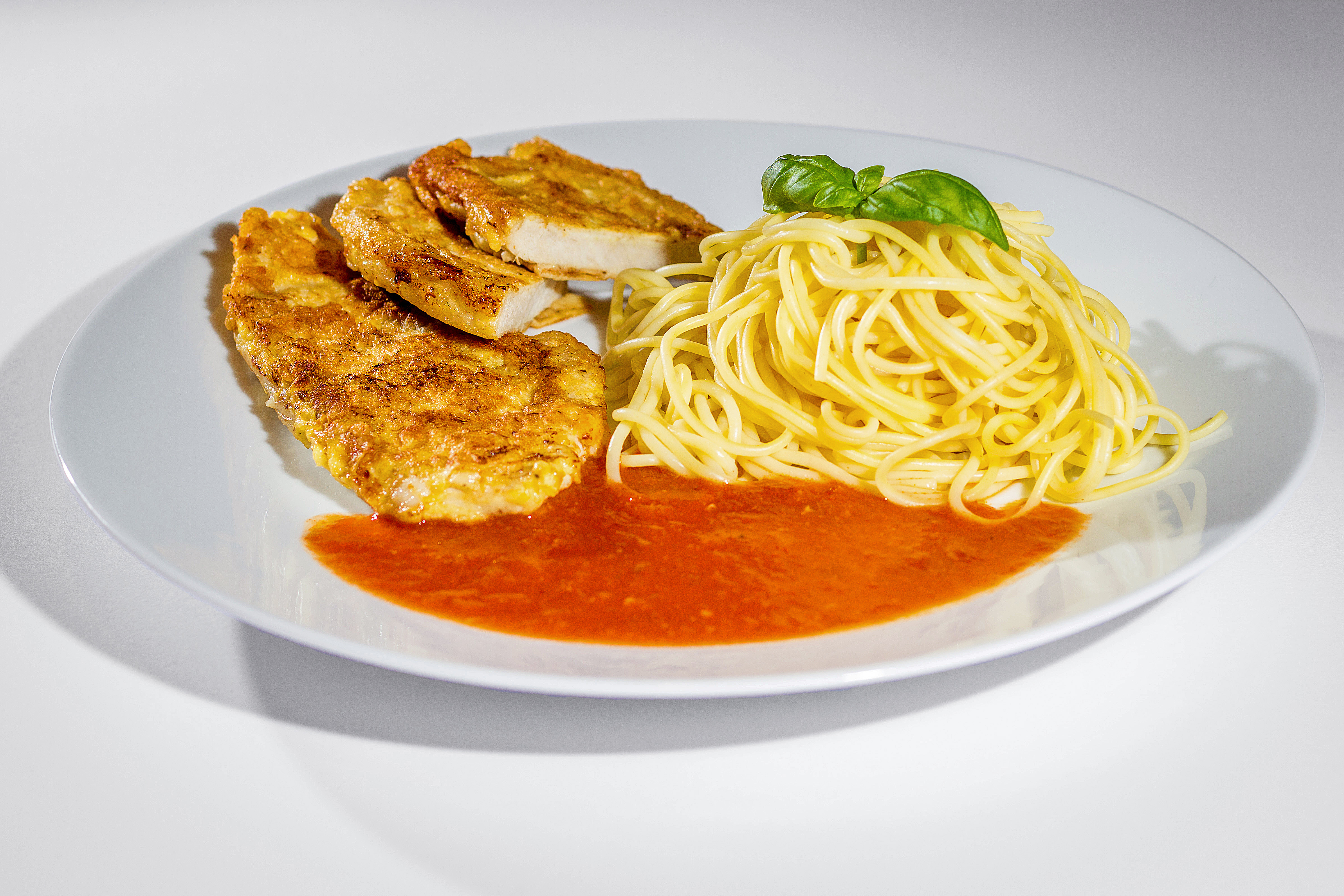 Piccata alla milanese, ein Gericht aus sehr kleinen Kalbsschnitzeln, die mit Mehl, Ei und durchgeriebenem Weißbrot – vermischt mit geriebenem Hartkäse wie Parmesan oder Grana Padano – paniert und in Butter gebraten und mit Tomatensauce serviert werden.